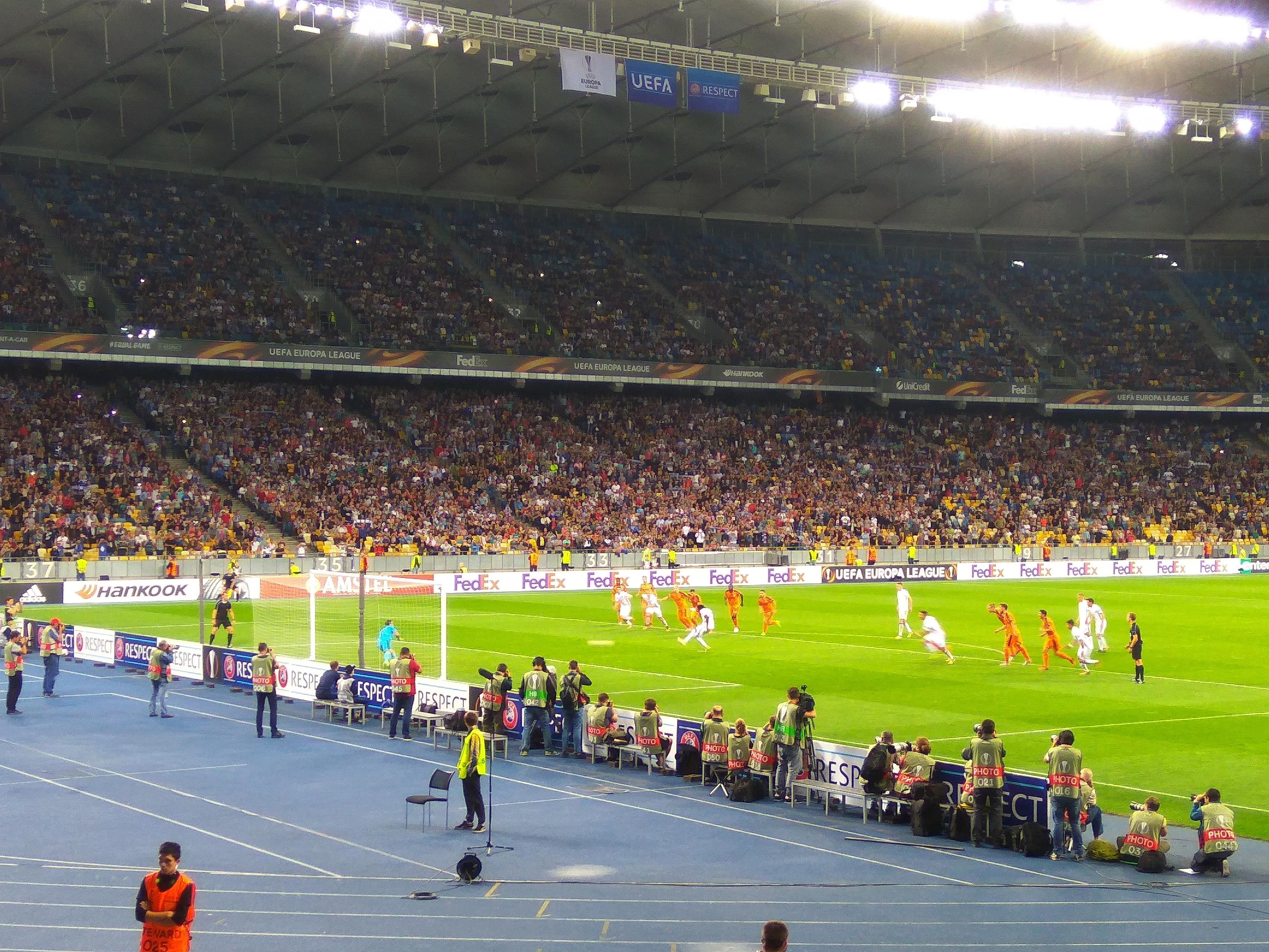 14.09.2017. Ліга Європи УЄФА Динамо (Київ) - Скендербеу 3:1. Дьйомерсі Мбокані пробиває пенальті